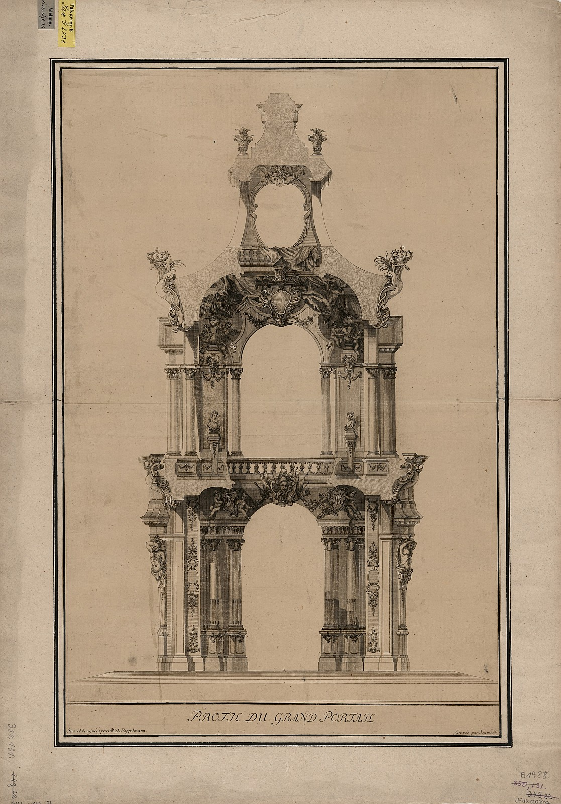 t